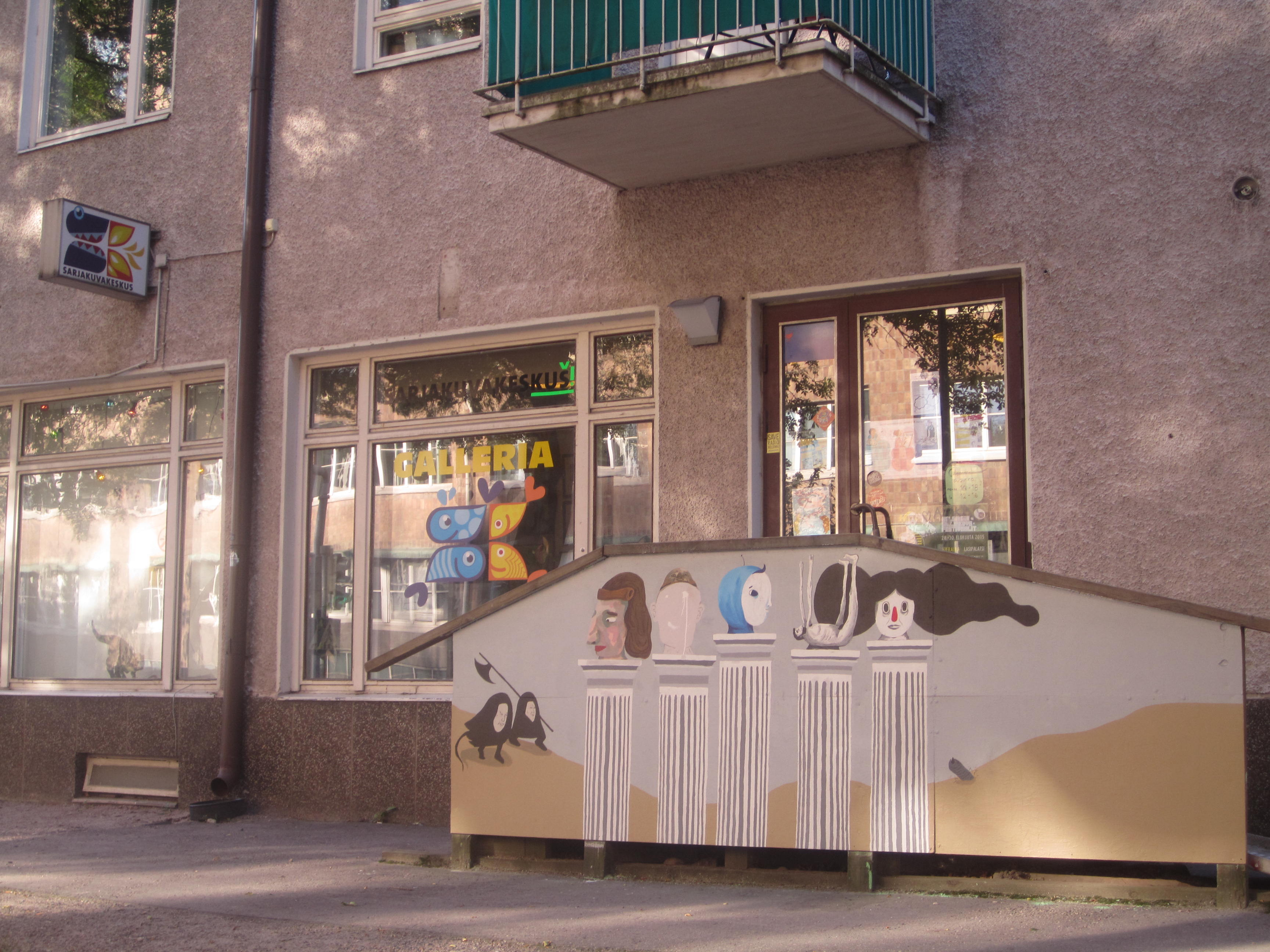 Helsingin sarjakuvakeskus Toukolassa.